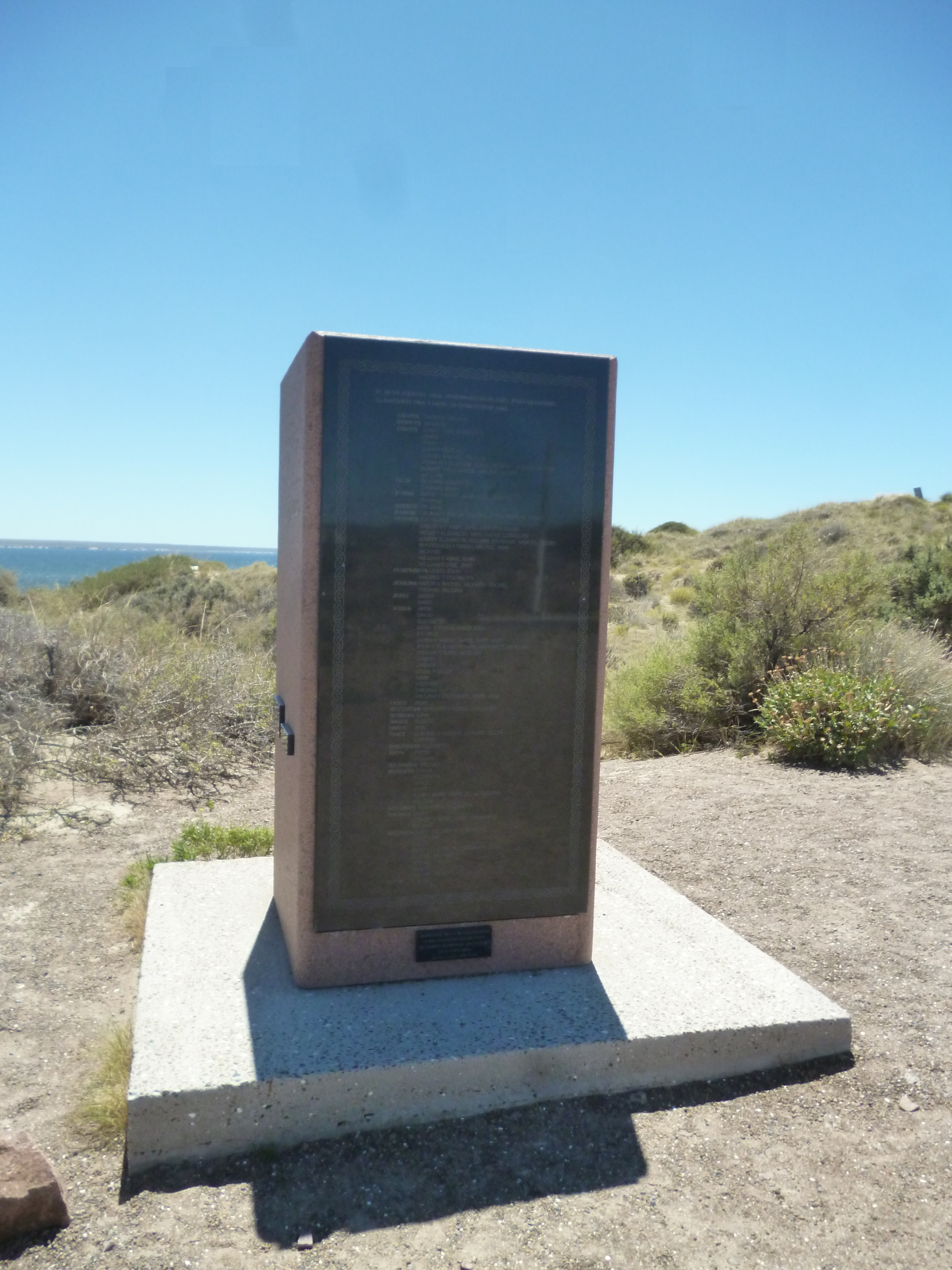 Monumento al desembarco galés, Punta Cuevas, Y Wladfa. La placa contiene los nombres de todos los colonos llegados en el Mimosa